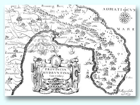 Terra d'Otranto, una mappa antica.